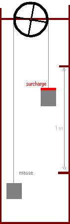 Schéma physique Machine d'Atwood